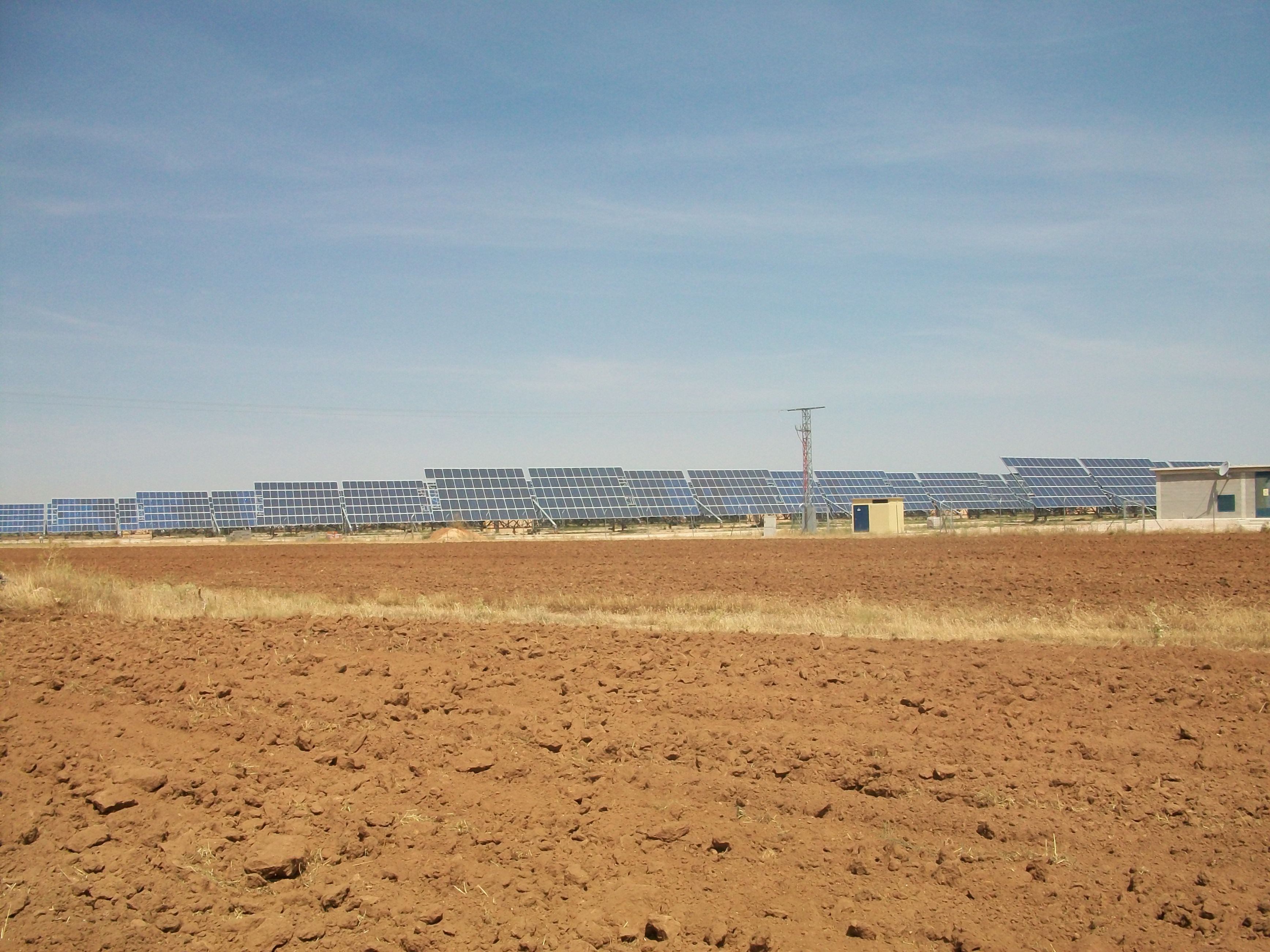 Parque solar fotovoltaico en Pedro Muñoz.